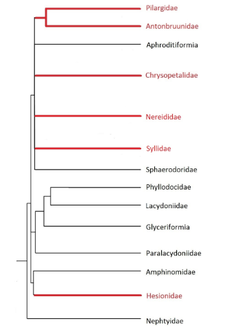 Cladograma construído com base nos trabalhos de Mackie et al 2015 mostrando as relações filogenéticas das famílias de nereidiformia e seus grupos irmãos